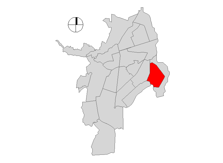 Comuna de Santiago de Cali, Colombia.